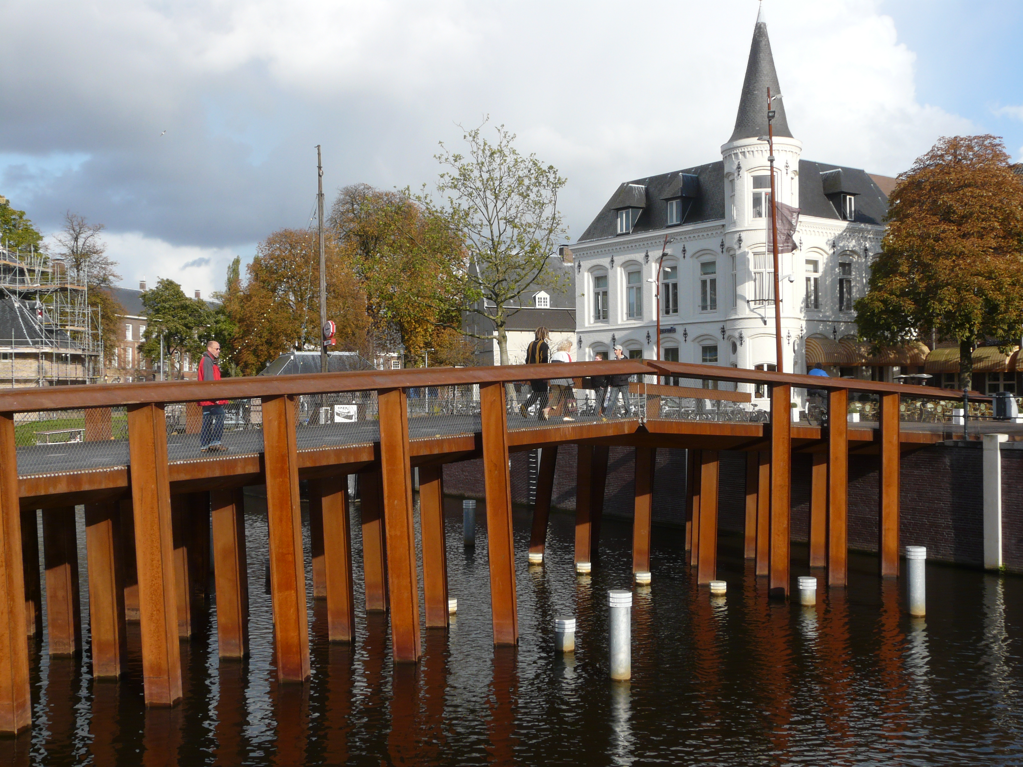 Zicht op een deel van de Hoge Brug (Breda). Gelegen nabij de Haven van Breda en het Spanjaardsgat